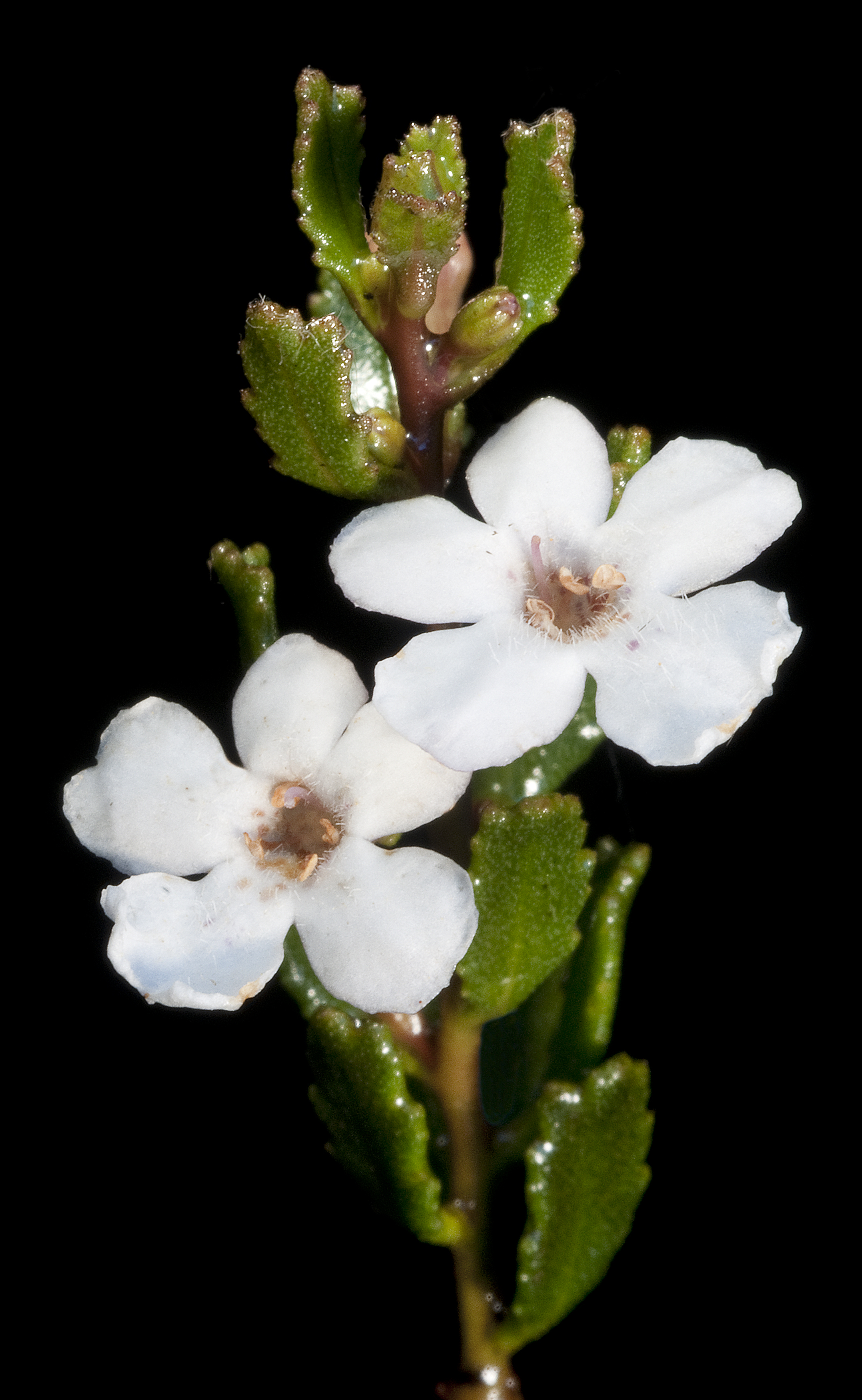 KRT4347